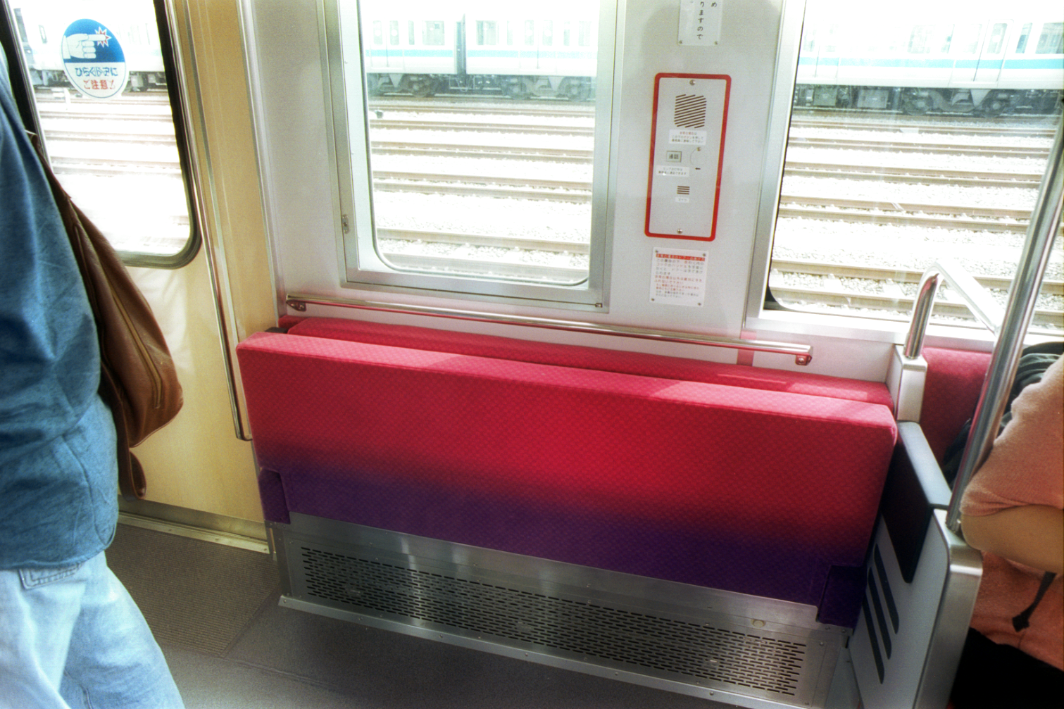 小田急3000形 (2代)の車椅子スペース部の折りたたみ座席